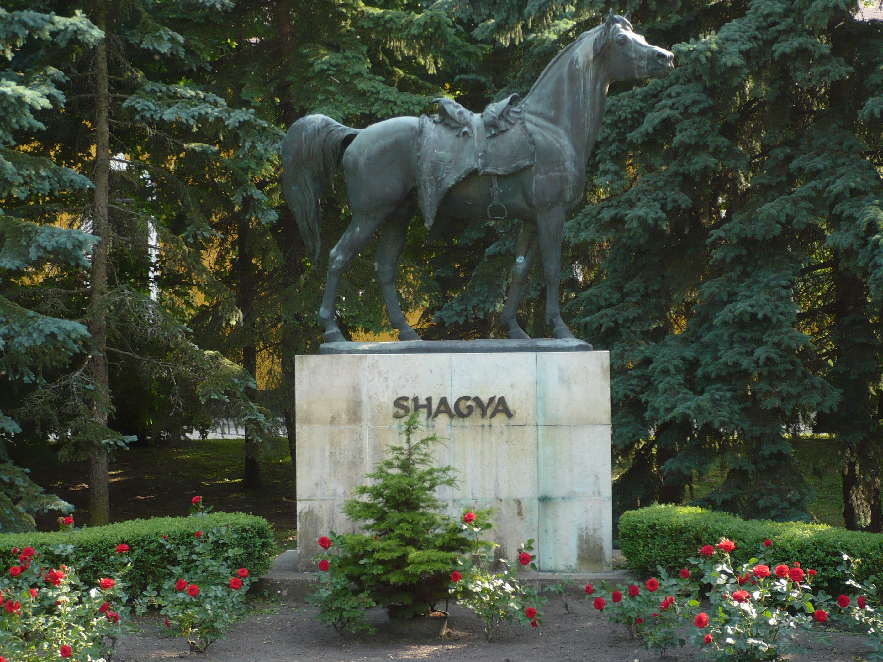 Ifj. Vastagh György: A bábolnai fehér mén szobra a bábolnai ménesudvarban (1939; a szobrot 1981 októberében öntötték)